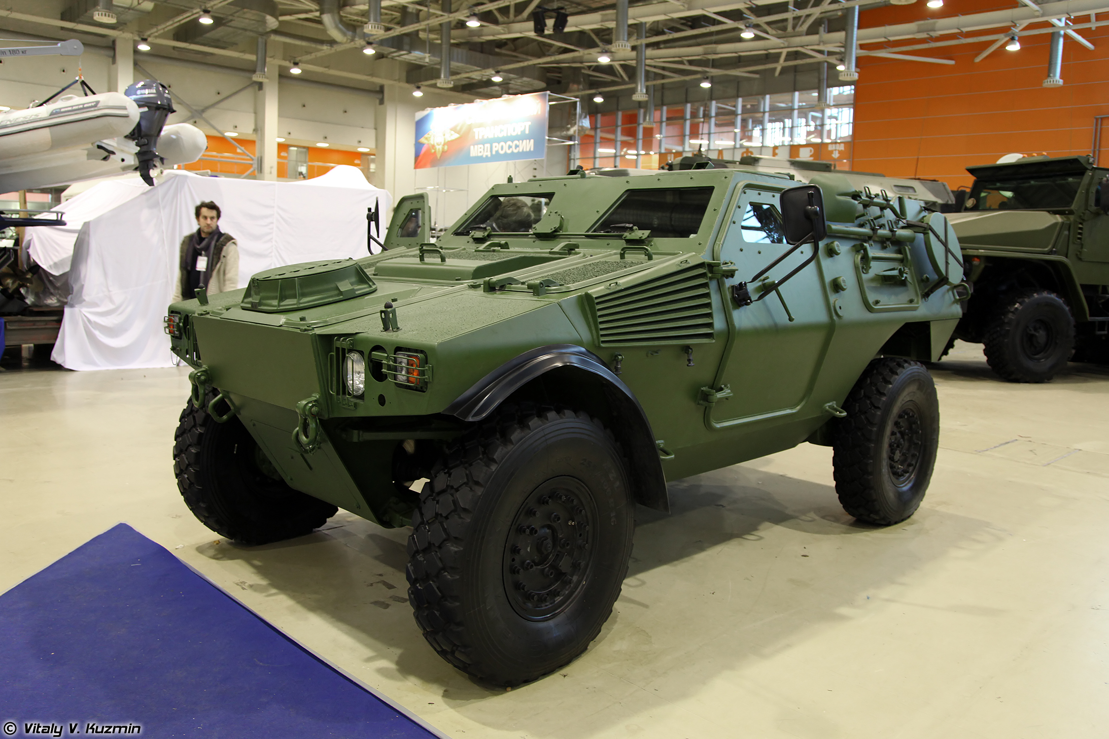 Бронеавтомобиль VBL